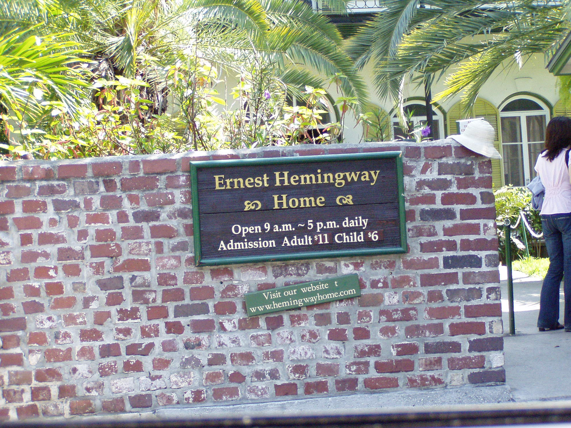 Fragment domu E. Hemingwaya w Key West i okalajacego go muru